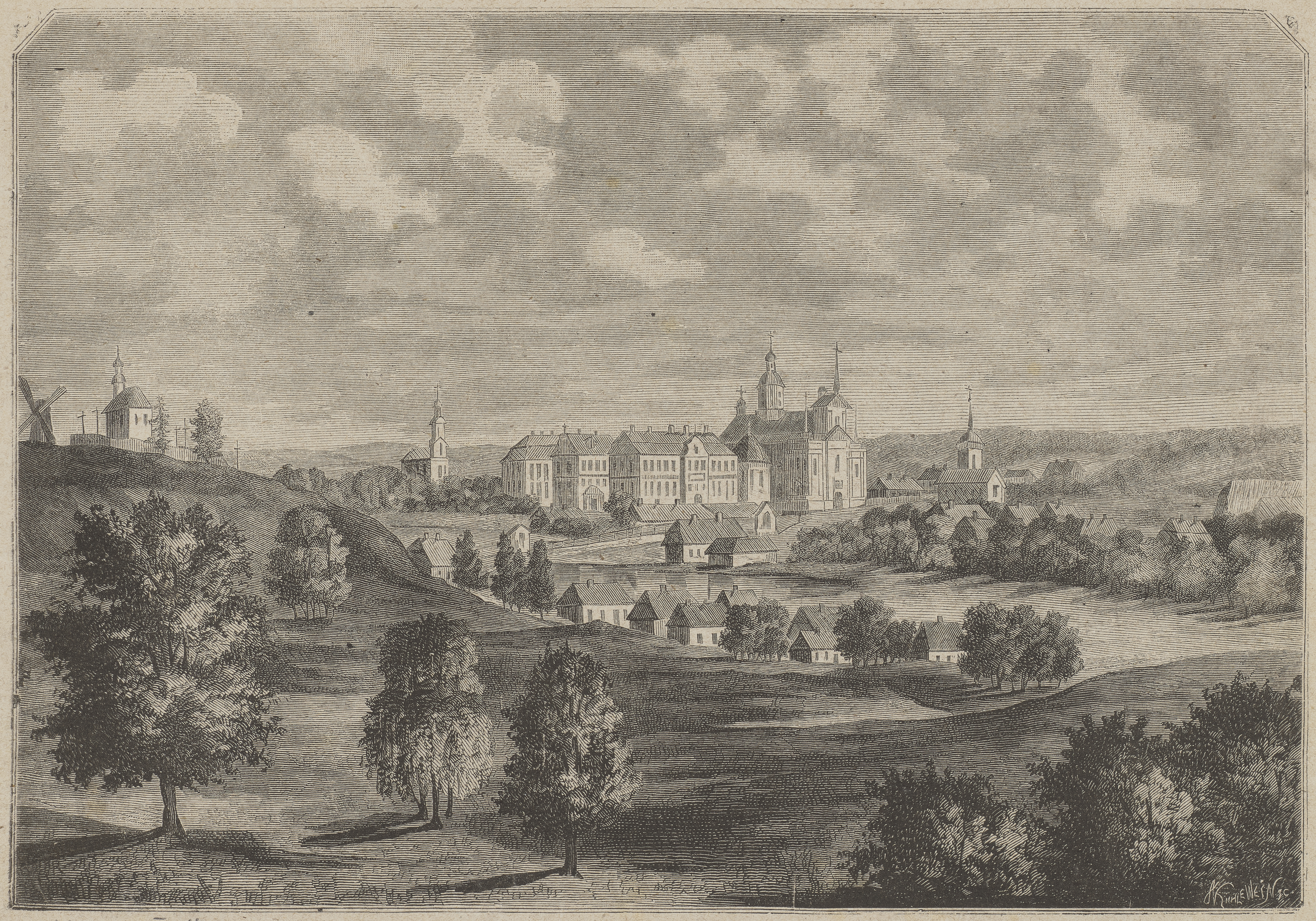 Беларуская (тарашкевіца): Жыровічы (Žyrovičy)